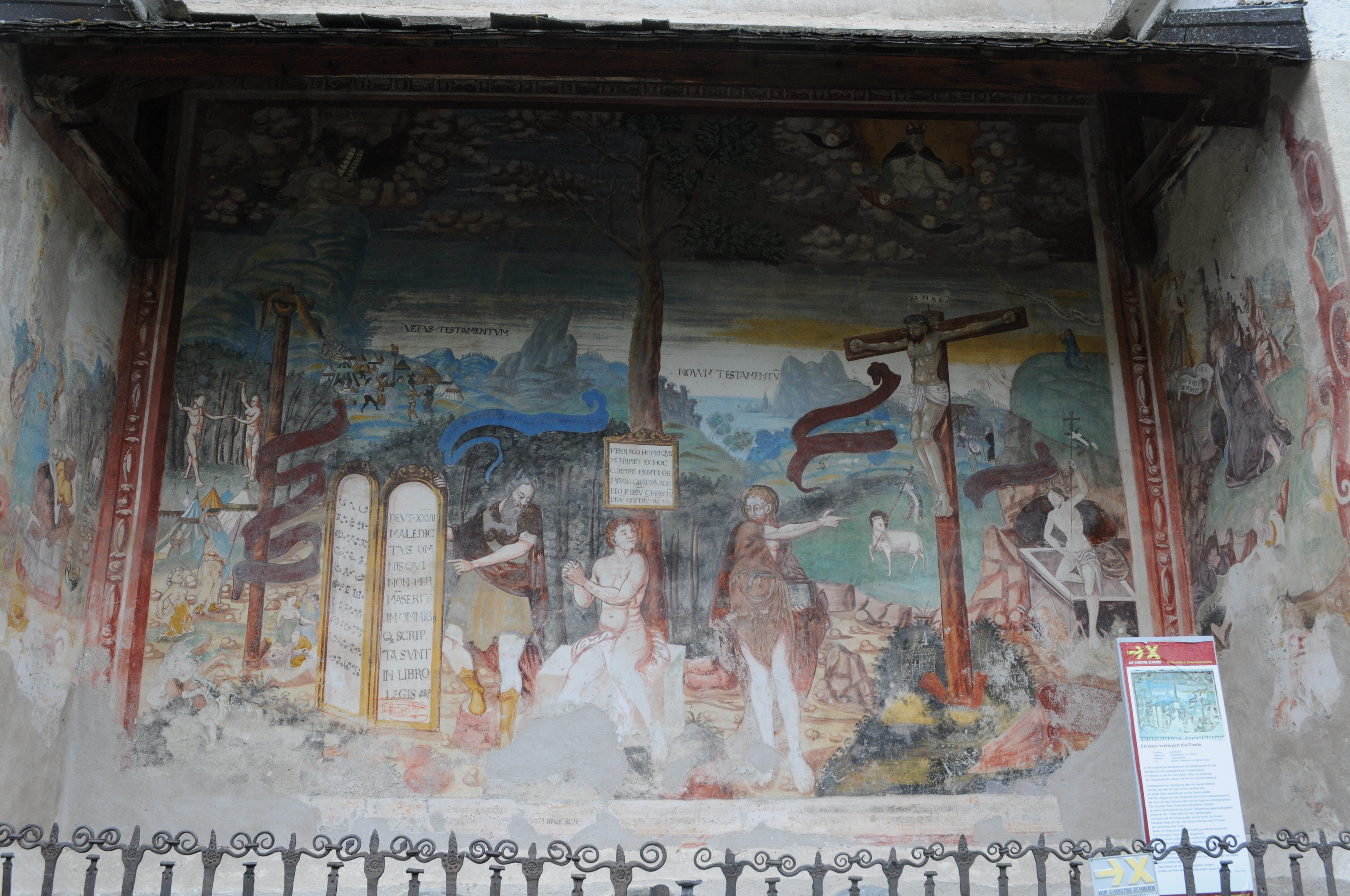 Fresken aus der Reformationszeit an der Südwand der Pfarrkirche in Ranten.